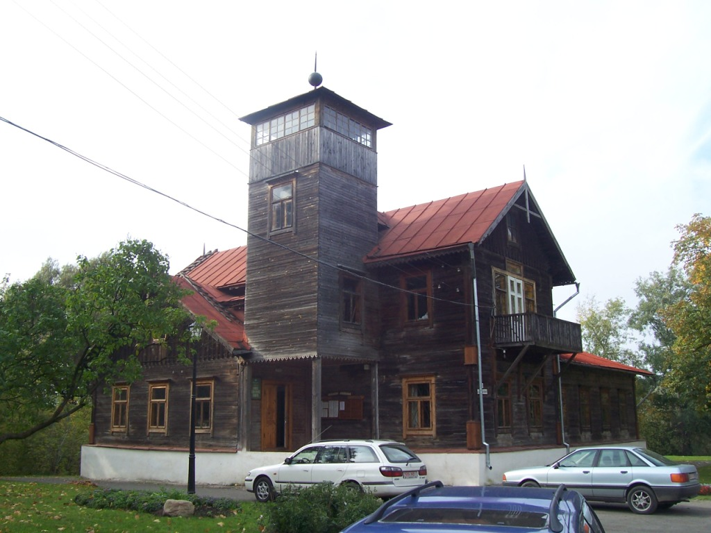 Loszyca_Manor_Green_House, Minsk, Bielarus; Зялёны дом ў Лошыцы (Менск)